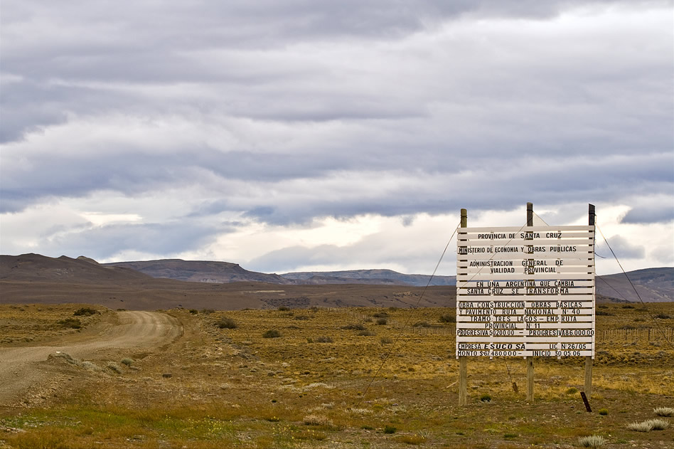 Cartel de la obra de pavimento en una de las secciones entre Tres Lagos y la Ruta Provincial 11, en la Provincia de Santa Cruz, Argentina.